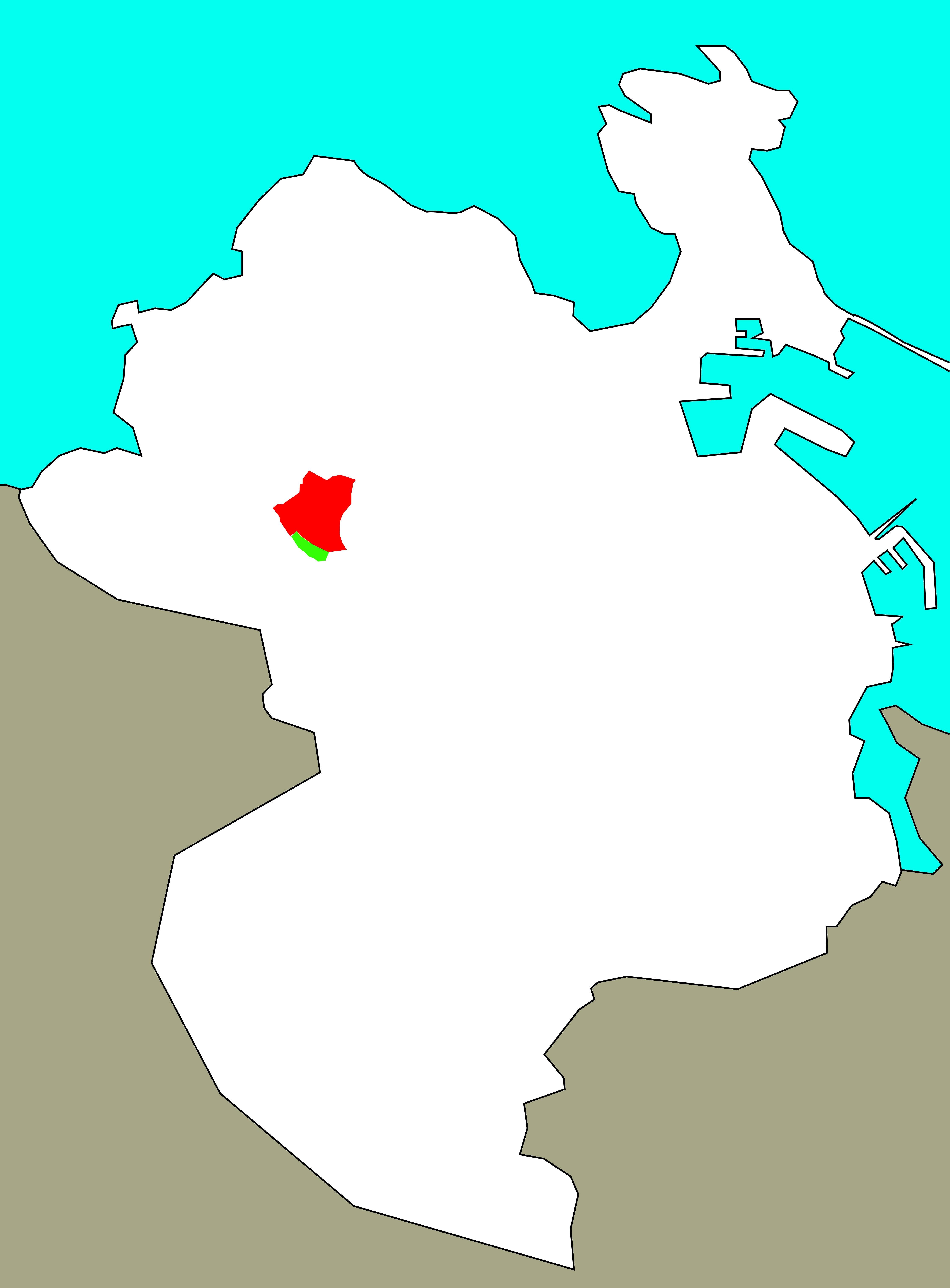 Situación de Comeanda (vermello) no concello da Coruña. En verde, urbanización Gatón-Comeanda.[1]